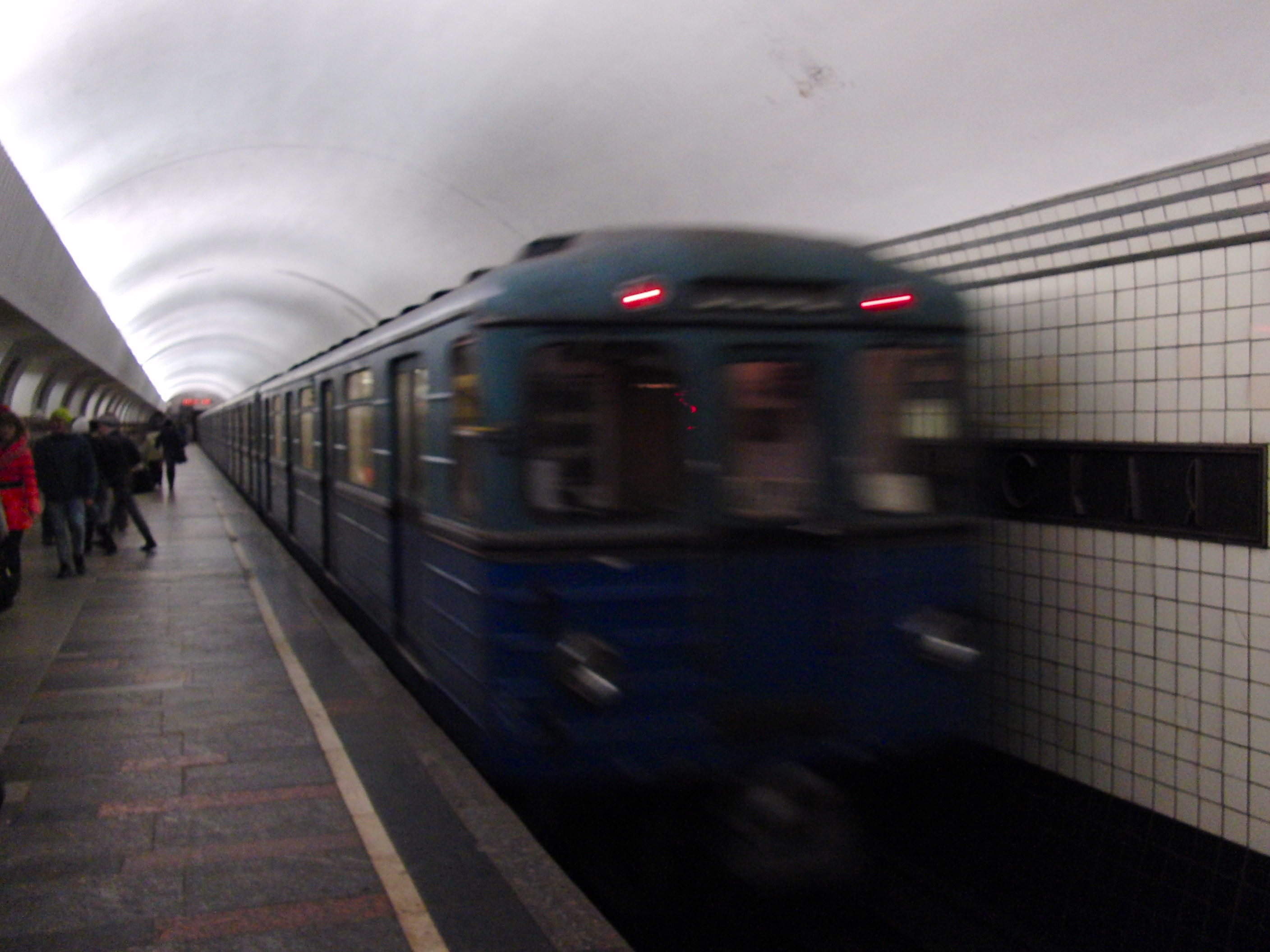 Taganskaya-radialnaya (Таганская-радиальная)